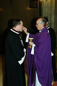 Caselli con Francisco en 2006